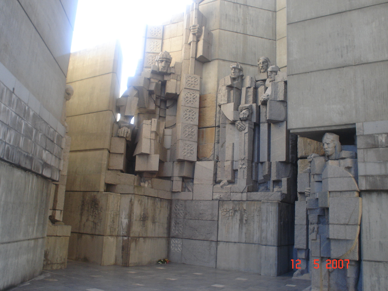 Паметникът на създателите на българската държава отвътре